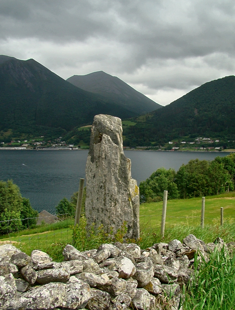 Bautastein på Indre Steinnes, Ørsta Kommune